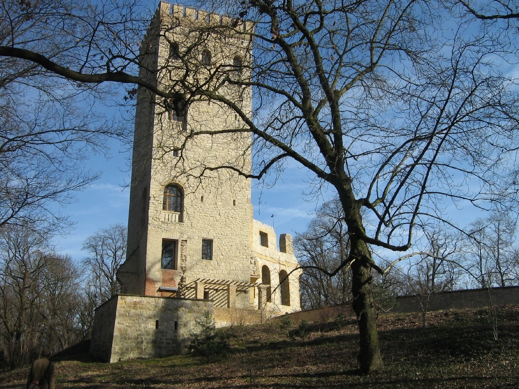 Ruinenberg in Potsdam (Brandenburg), 74,1 m hoch und ehemals Hünenberg, Heineberg oder auch Höneberg genannt. Auf ihm steht eine künstliche Ruine im normannischen Stil. Hauptzweck der Anlage war die Errichtung eines Wasserbassins zum Betreiben der großen Fontäne im Schloßpark Sanssouci. Es hat aber nie geklappt.